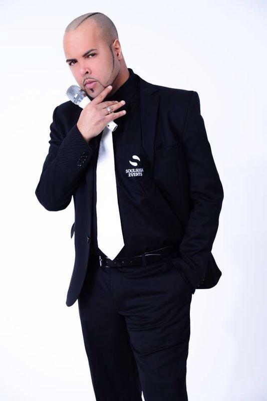 Akay 2013 beim shooting